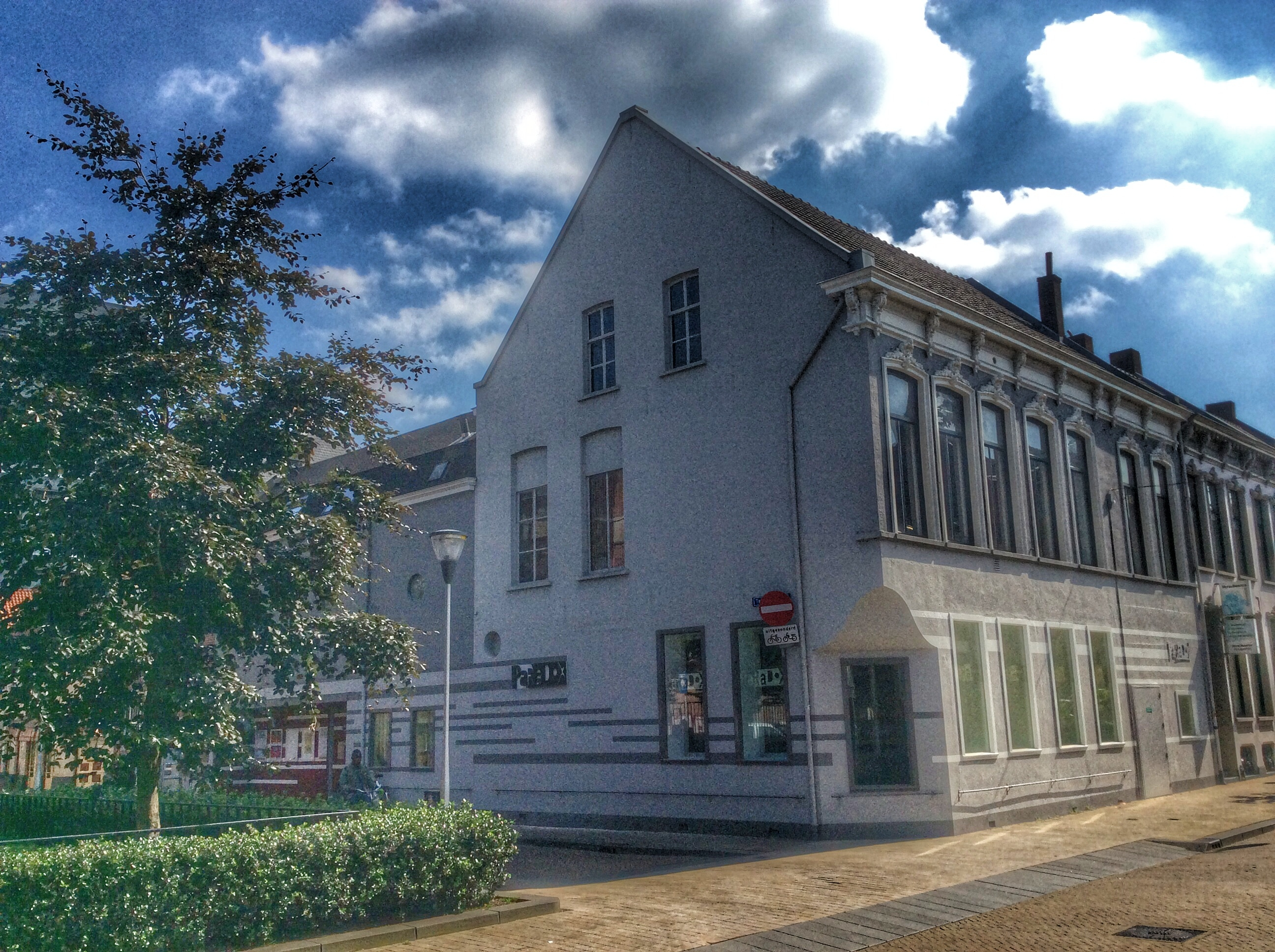 Het gebouw van PaRaDox in 2014.